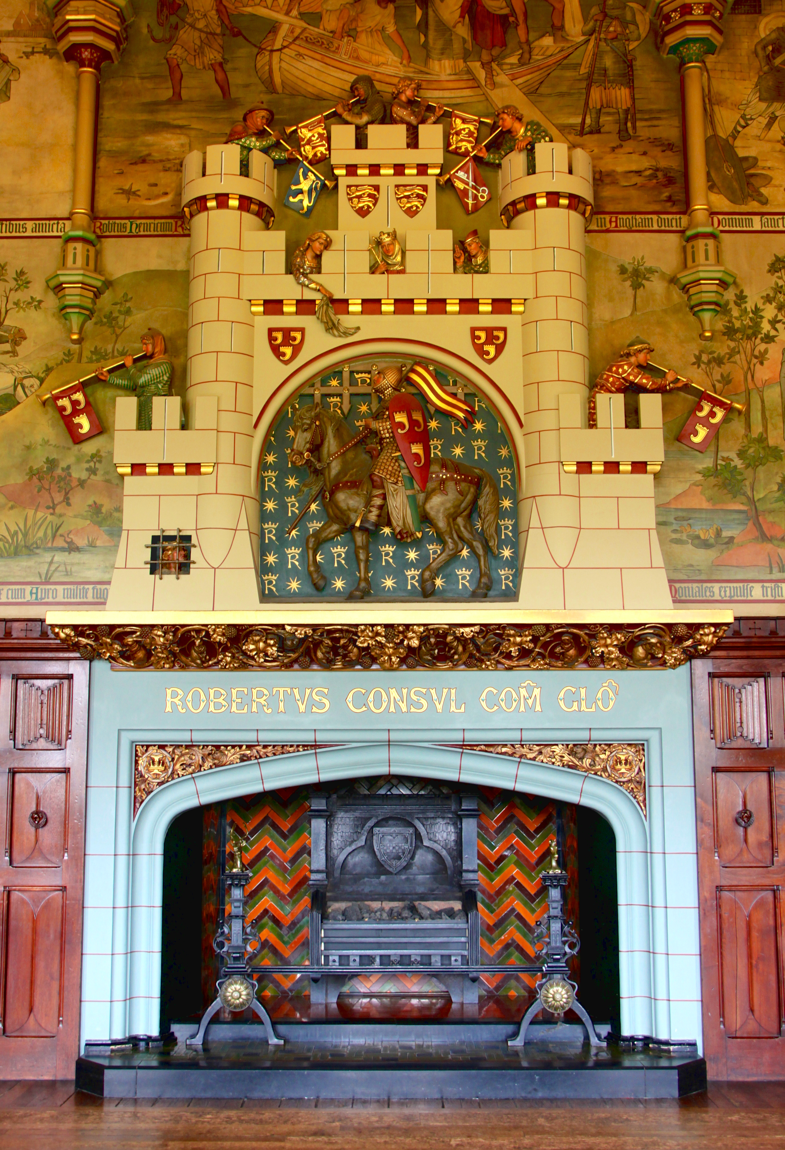 Камин в большом зале Кардиффского замка